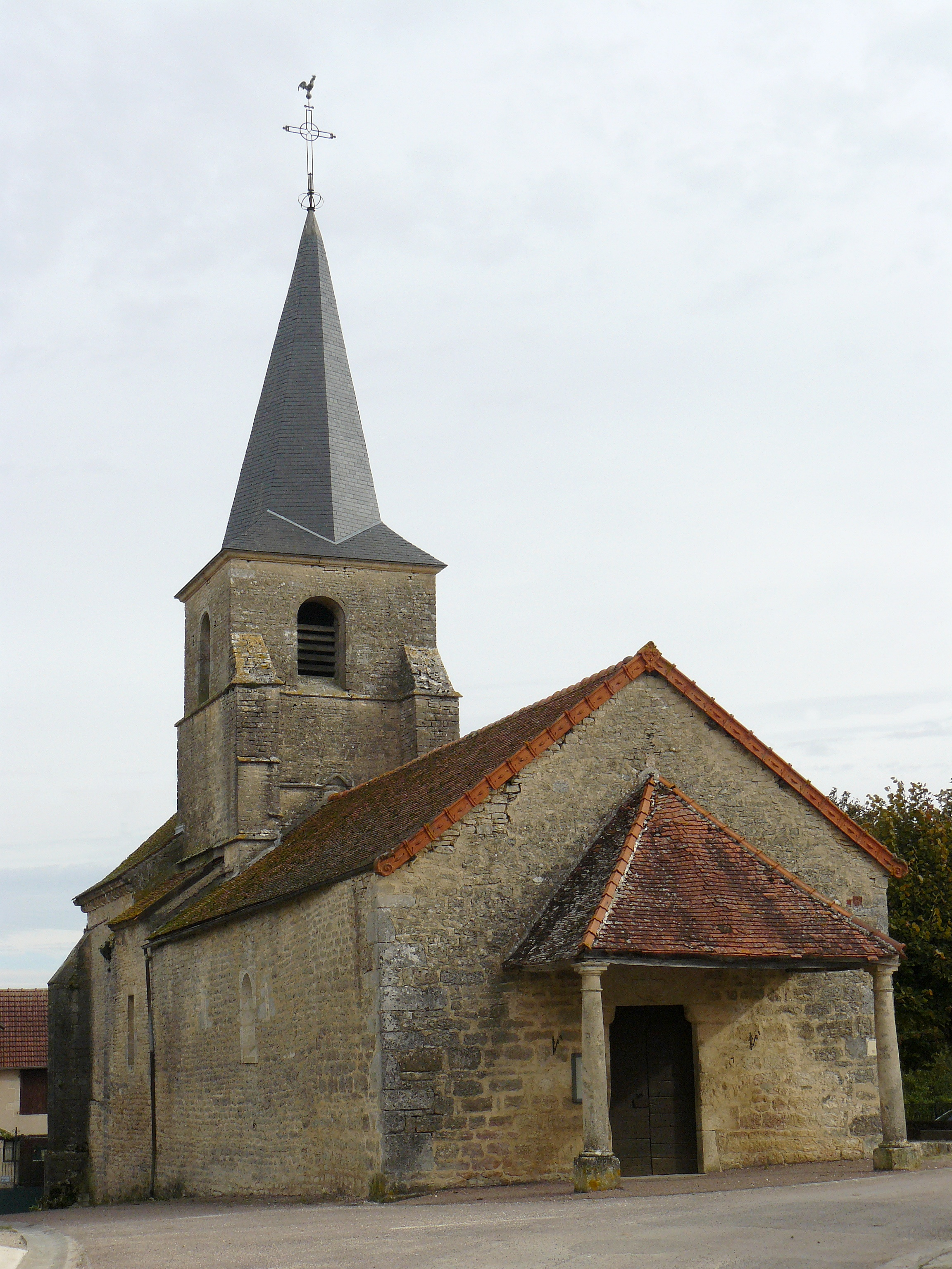 Église de Mosson (Côte-d'Or, France)